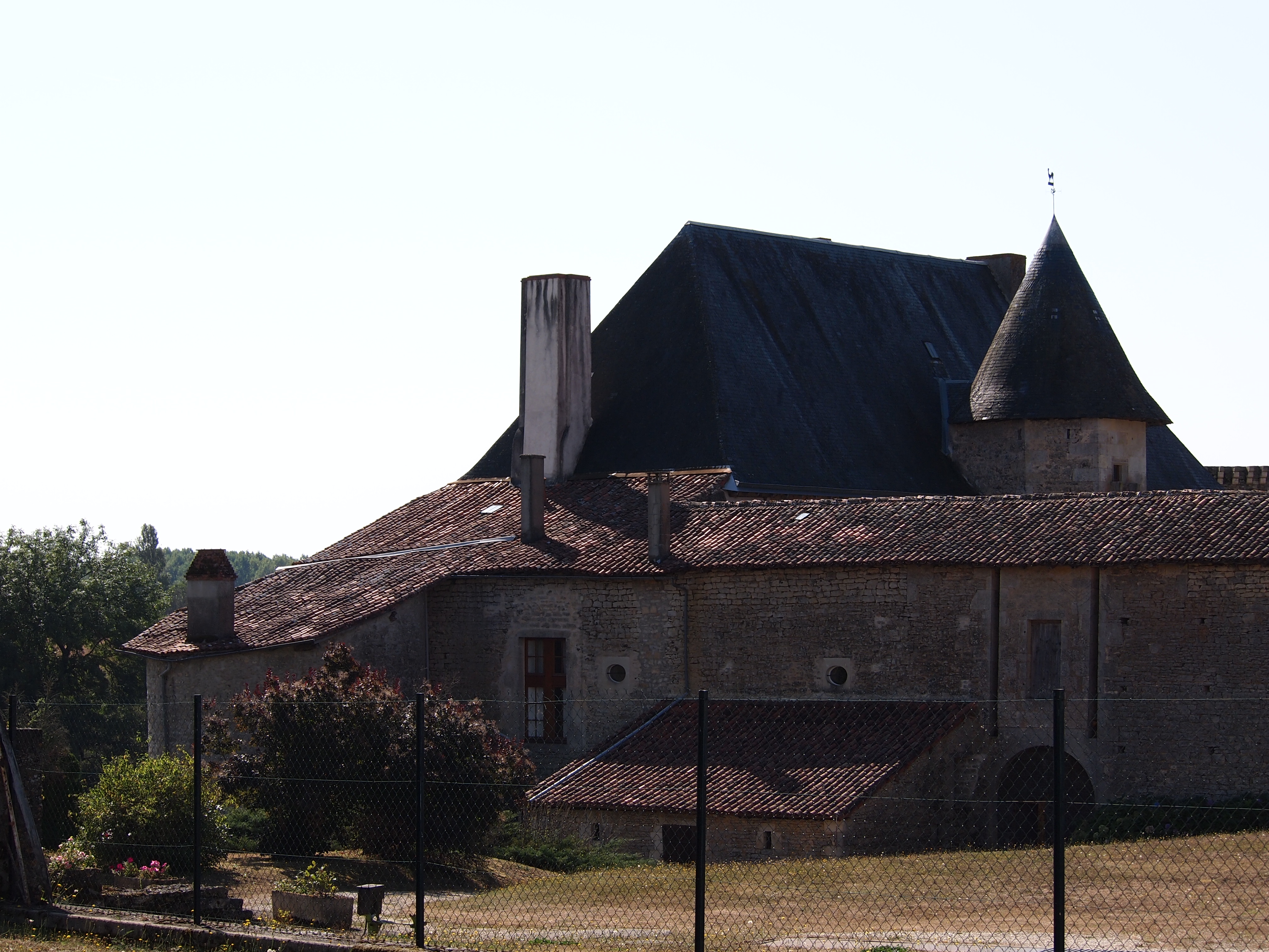 Château d'Ordières, à Benest en Charente (inscrit, 1989)